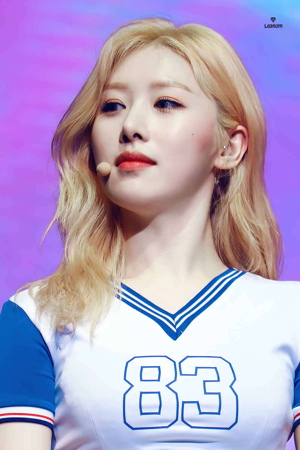 180303 유니티 팬미팅